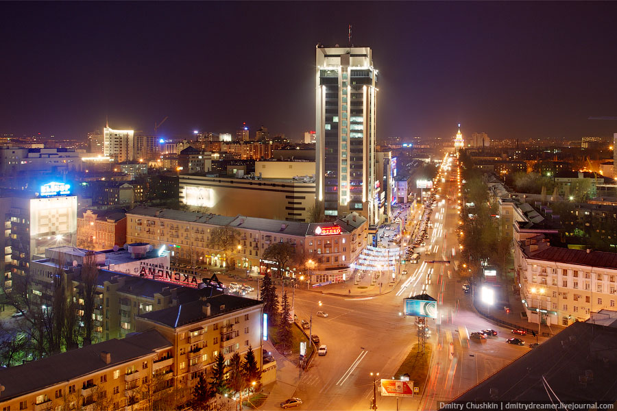 Пересечение Кольцовской улицы с Плехановской улицей